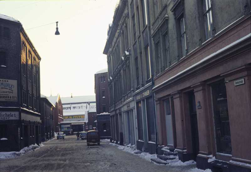 Tomtestredet fotografert mot Østbanestasjonen ca. 1960-1965. Hjørnet mot Repslagergangen i venstre bildekant